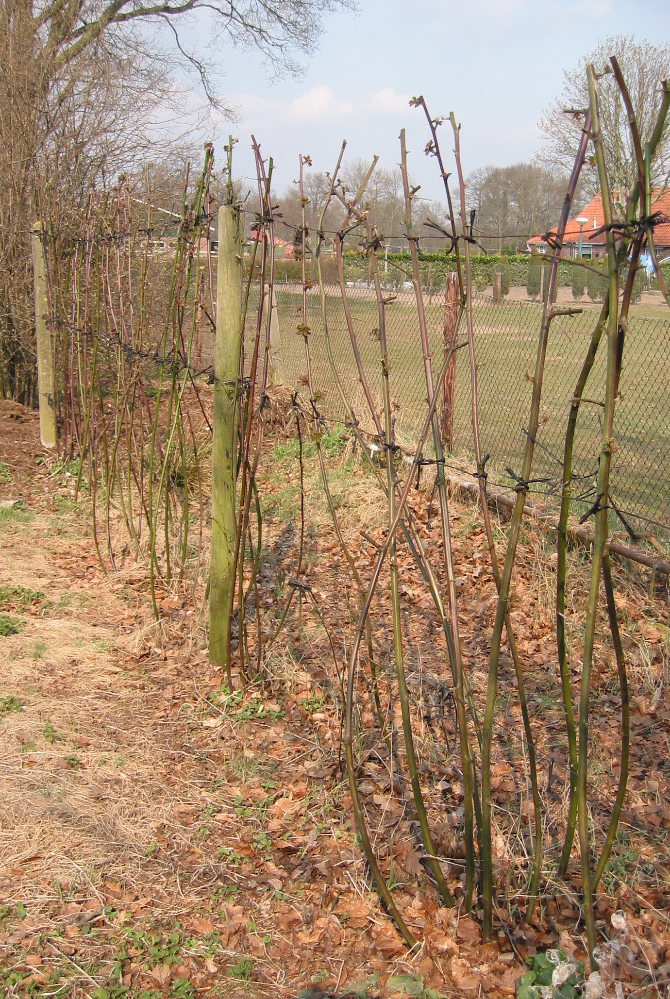 (nl: Braam in voorjaar 'Thornfree') Rubus 'Thornfree' in spring